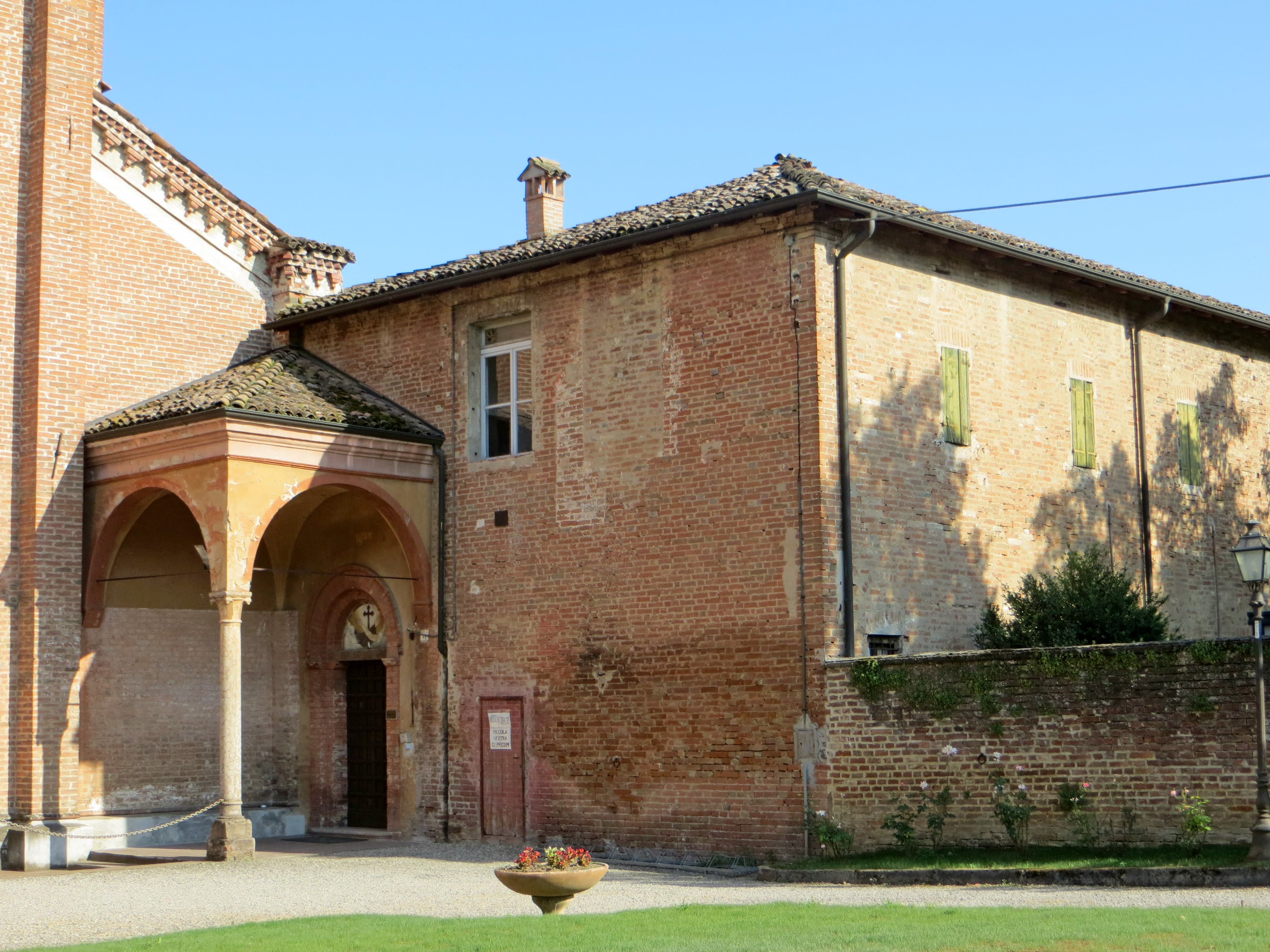 Chiesa di Santa Maria degli Angeli (Busseto) - ingresso del convento